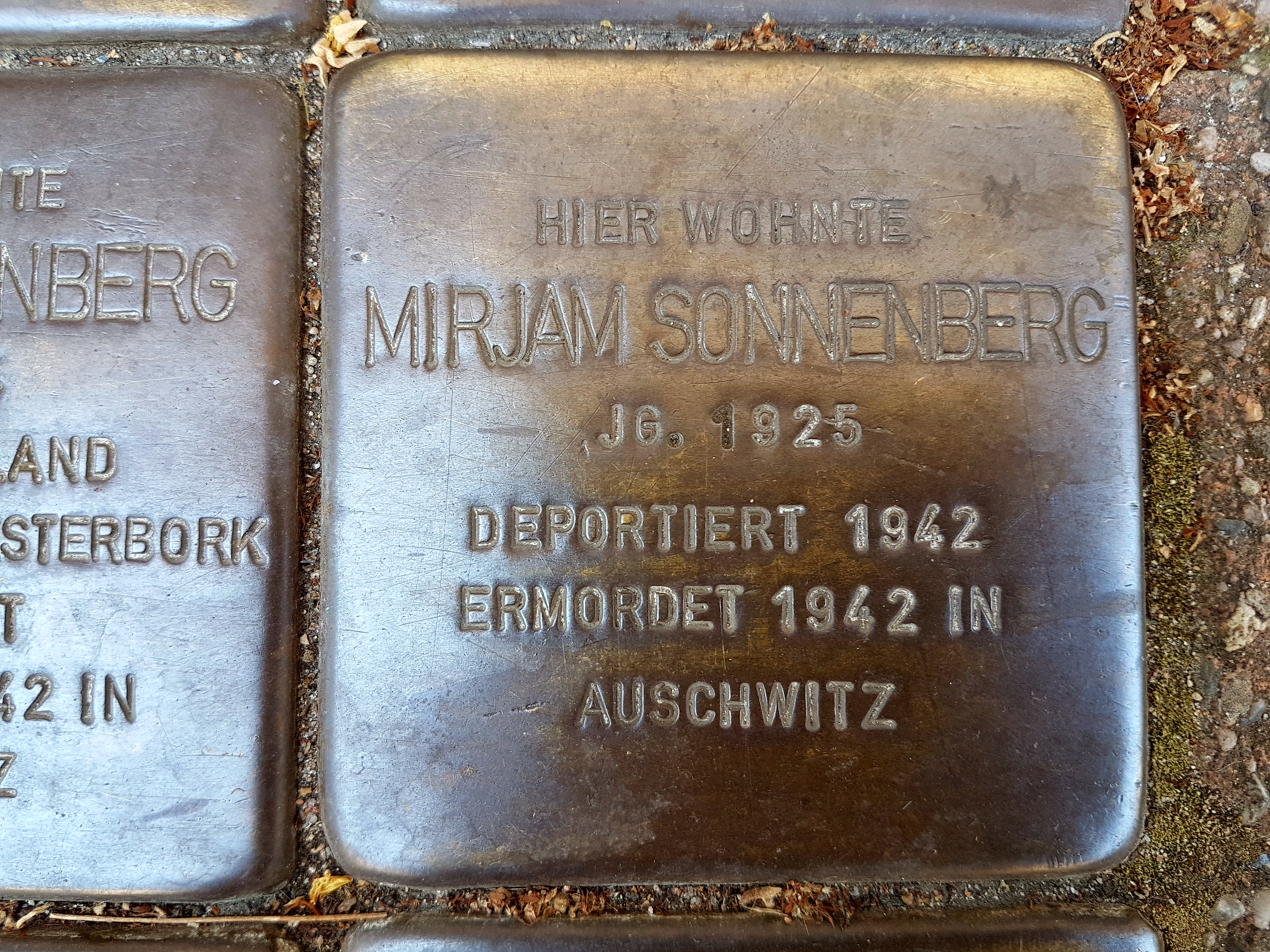 Mirjam Sonnenberg Stolperstein Duisburg